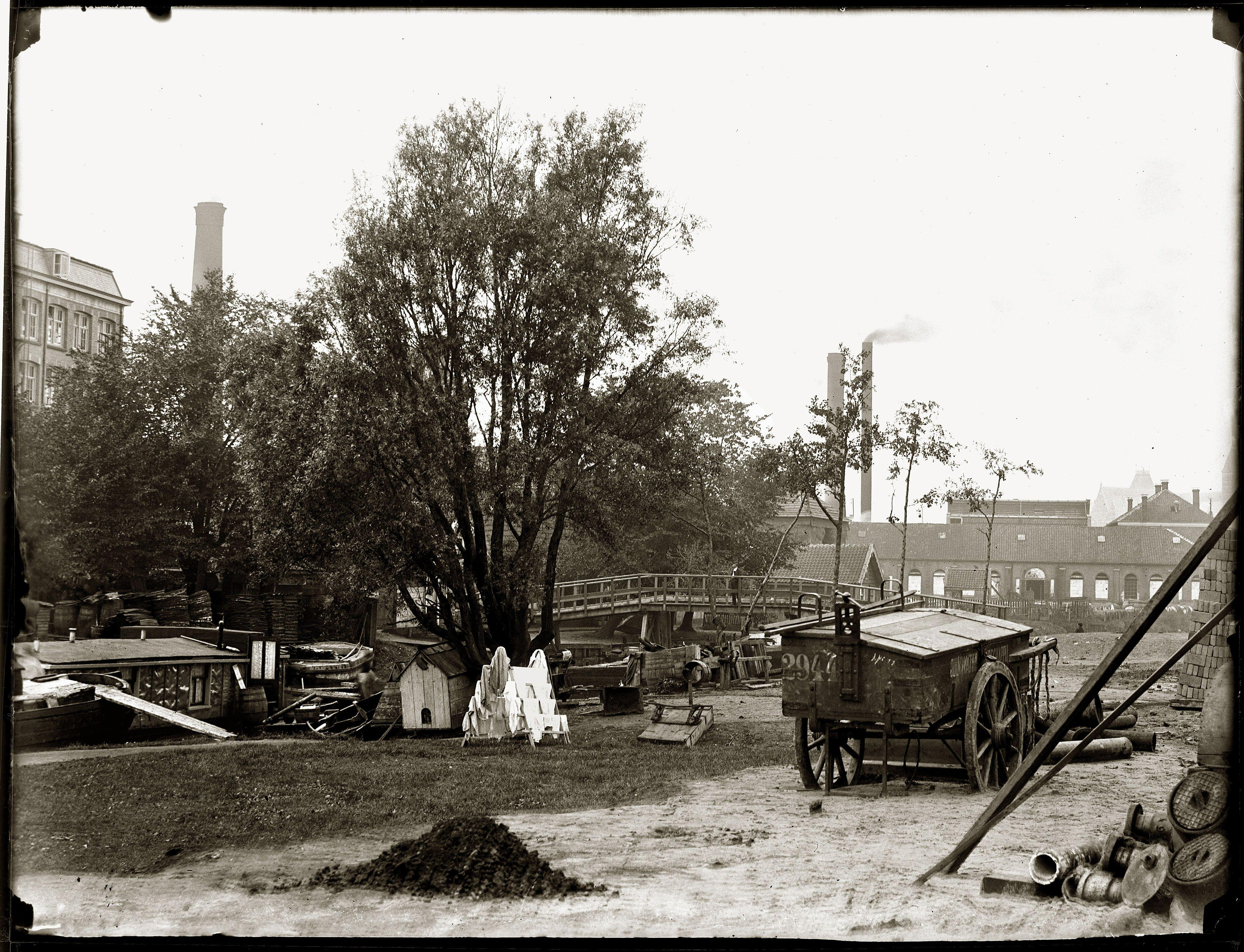 Beschrijving Ruysdaelkade Brug over de Boerenwetering voor de Ruysdaelstraat``, gezien naar de Waskaarsenfabriek. Documenttype Generated with Dememorixer